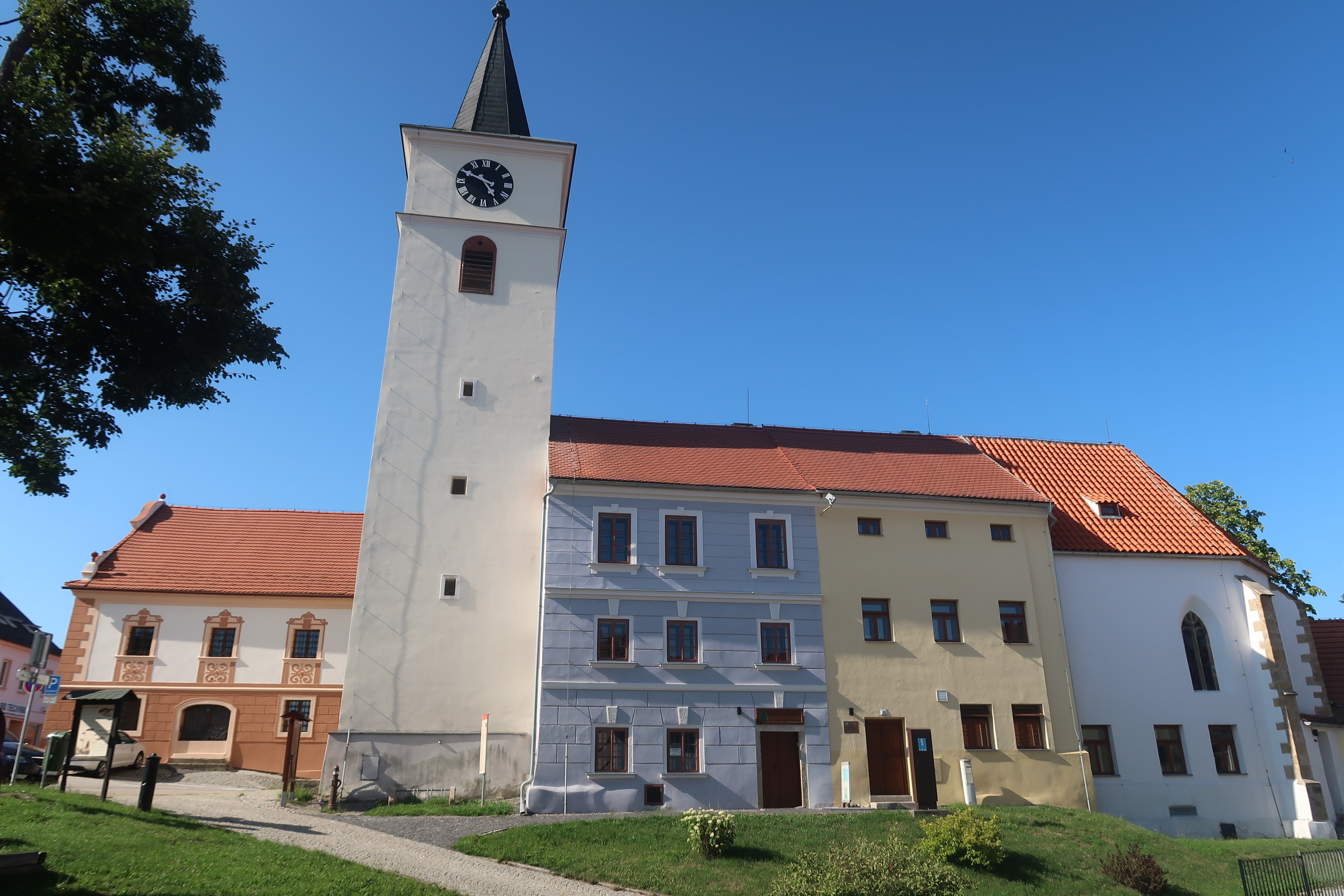 Radnice a bývalý kostel sv. Filipa a Jakuba přestavěný na bytové domy